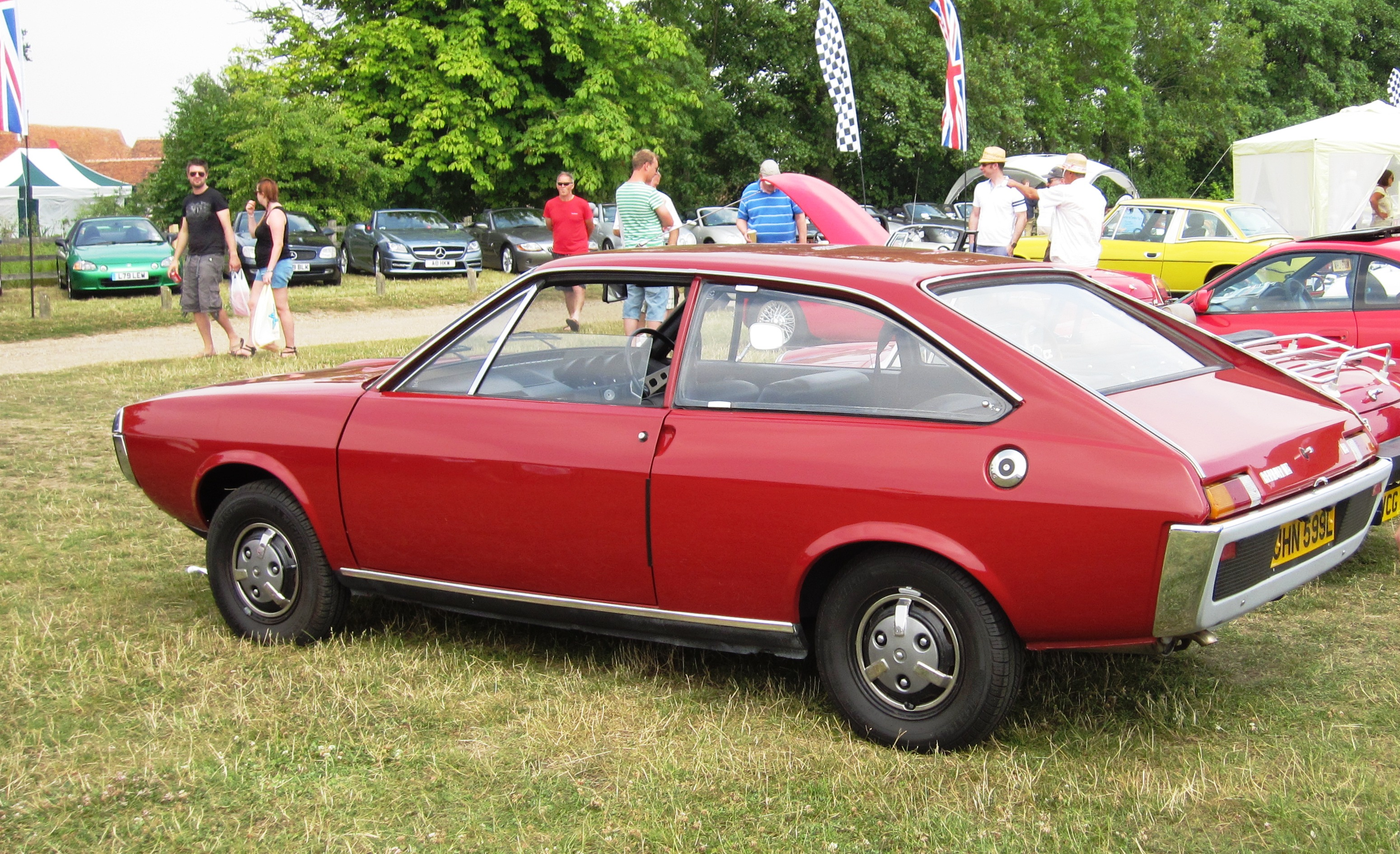 Renault 15 (1973)